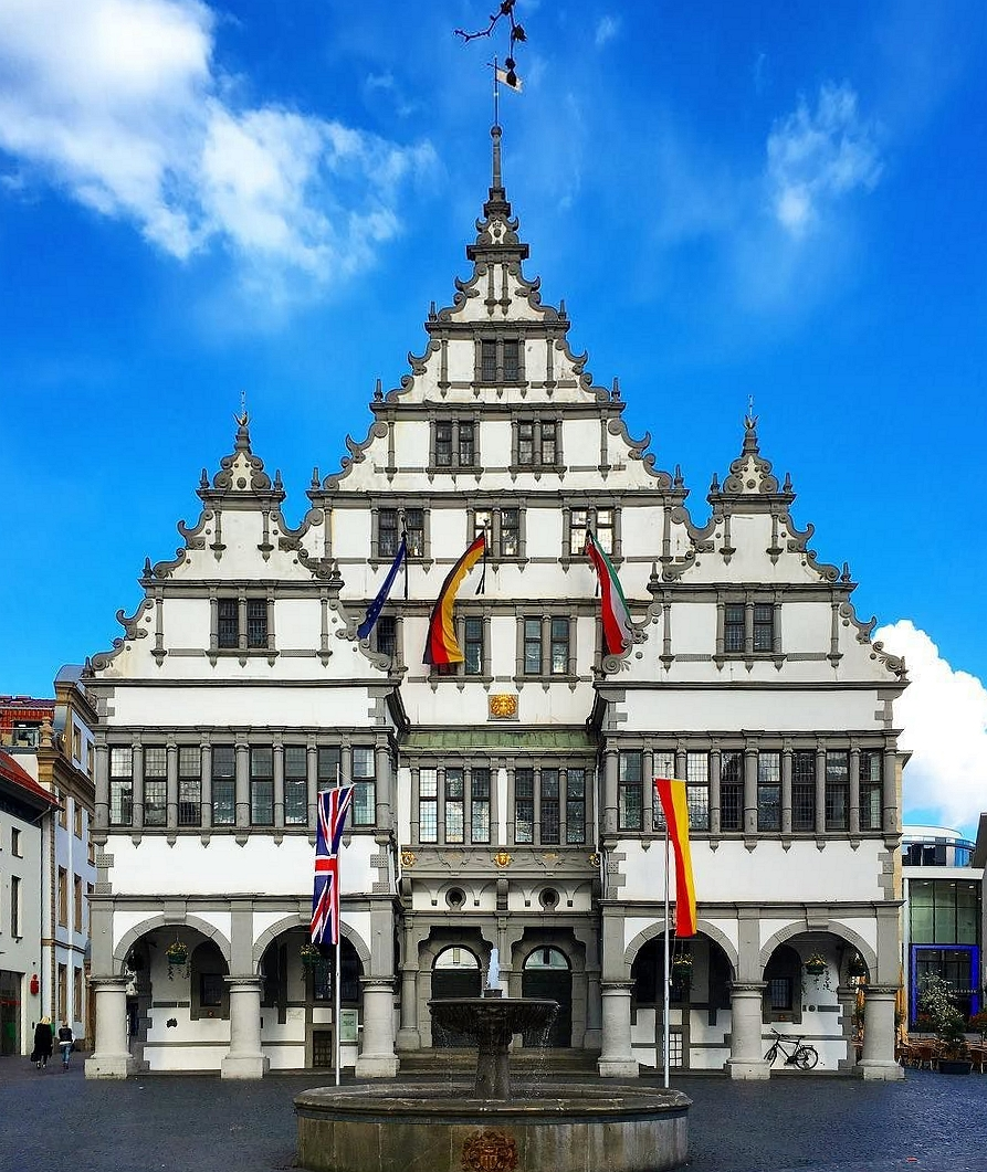 Rathaus Paderborn This is a photograph of an architectural monument.